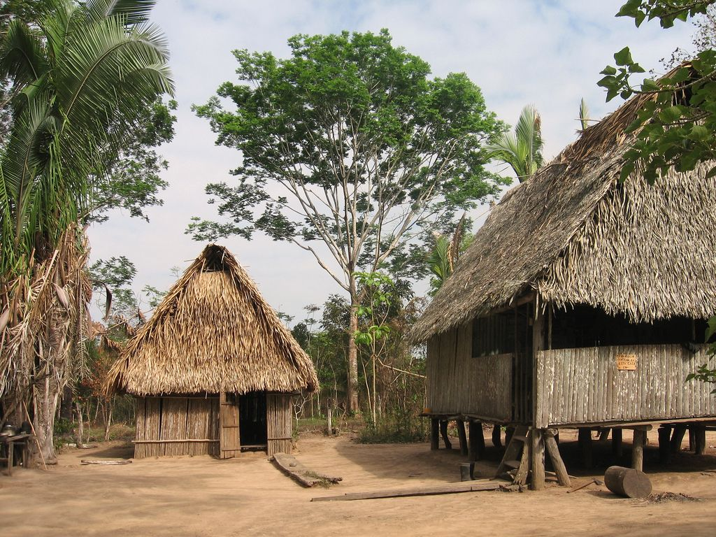 Casa y cocina de la casa de madera hecha de palmeras.Runa Simi: Huk Shipipu wasi.